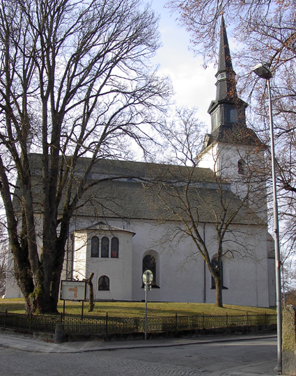 Lindesbergs kyrka, sedd från norrsidan.